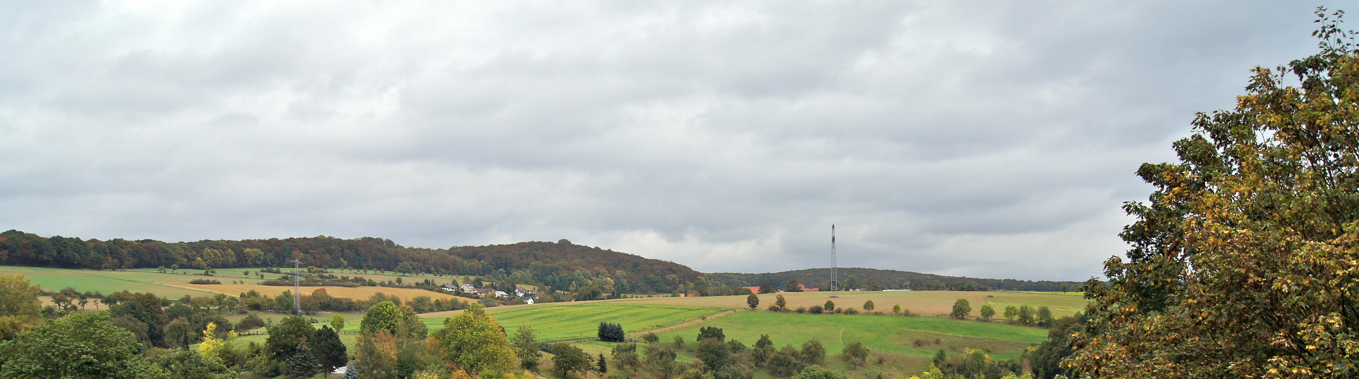 Höhenzug Hube Andershausen